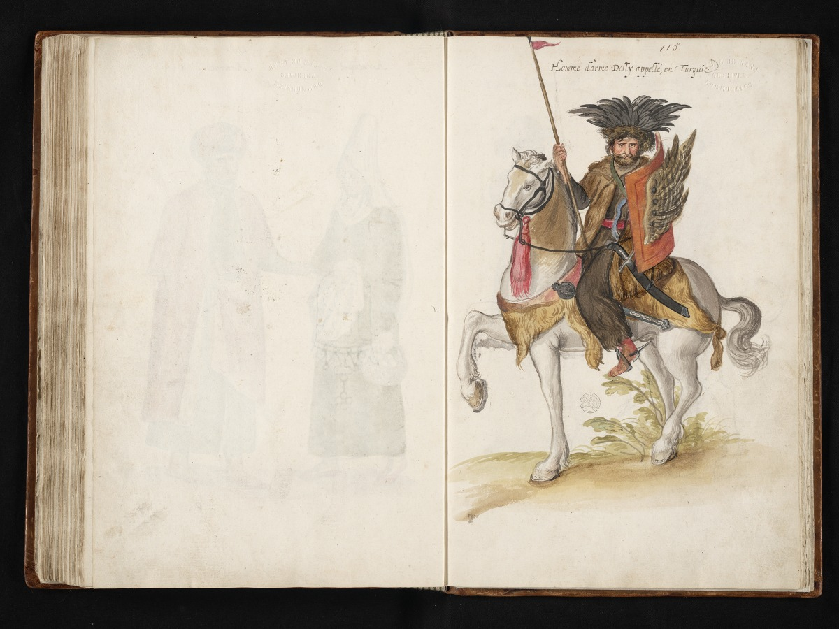 Акварель Лукаса де Геера из книги "Théâtre de tous les peuples et nations de la terre avec leurs habits et ornemens divers, tant anciens que modernes, diligemment depeints au naturel par Luc Dheere peintre et sculpteur Gantois".